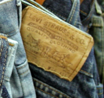 Levi's márkájú farmernadrág bőrcímkéje